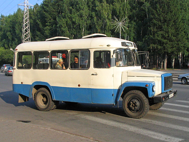 Bus KAvZ-3976 in Tomsk; Автобус КАвЗ-3976 в Томске